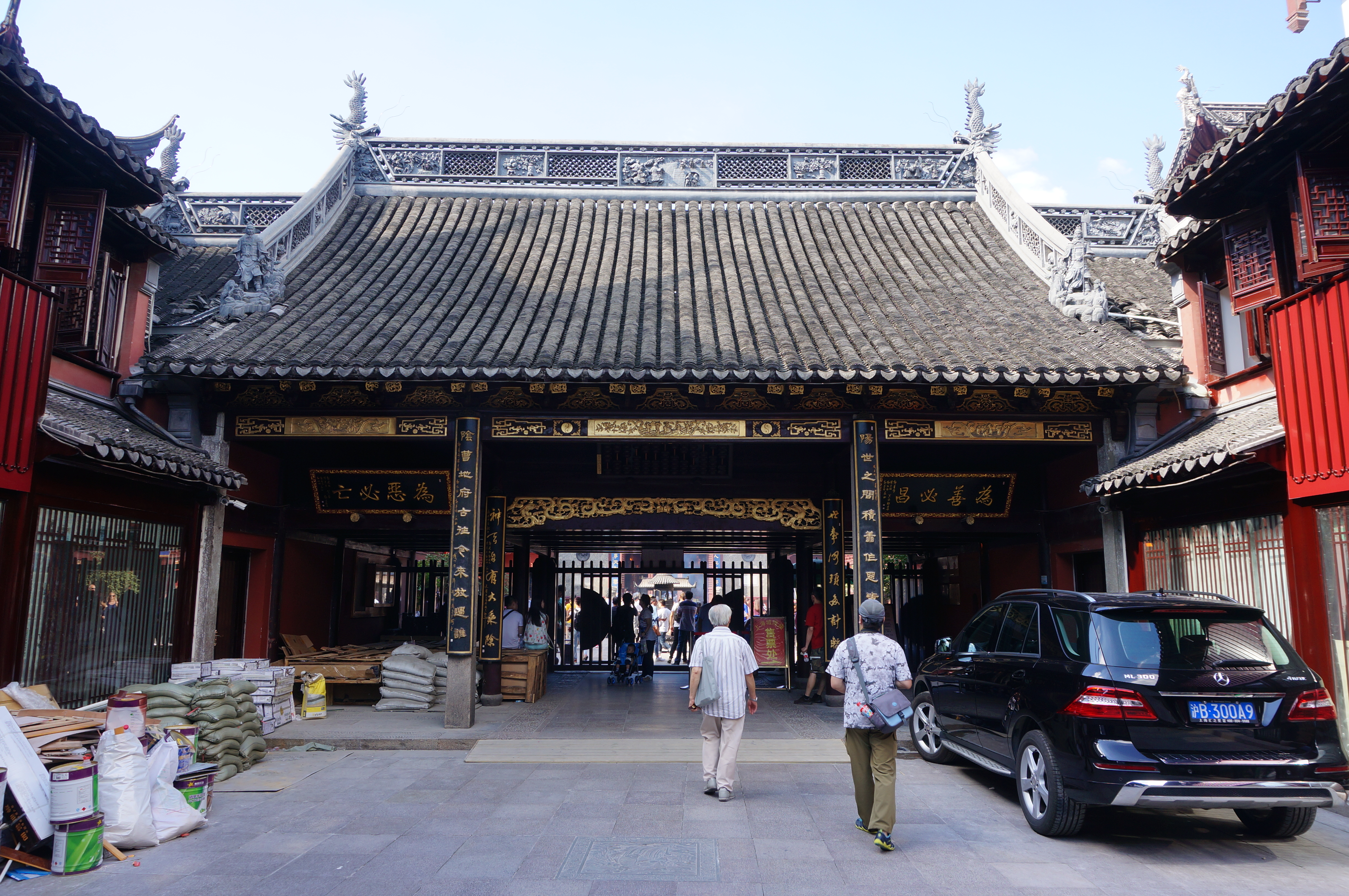 上海城隍庙，仪门南侧。